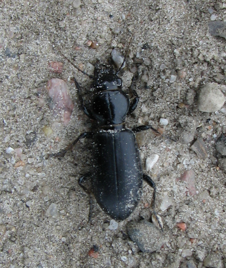 Broscus cephalotes